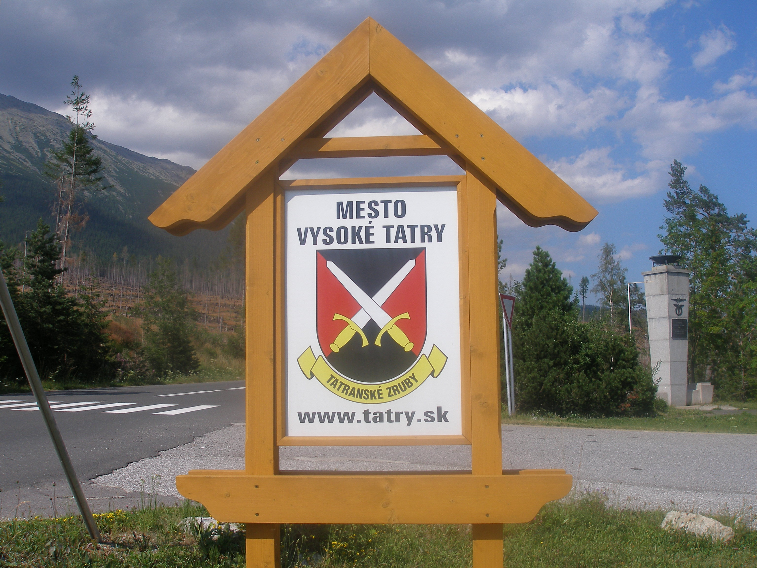 Osada Tatranské Zruby, Vysoké Tatry, Slovakia